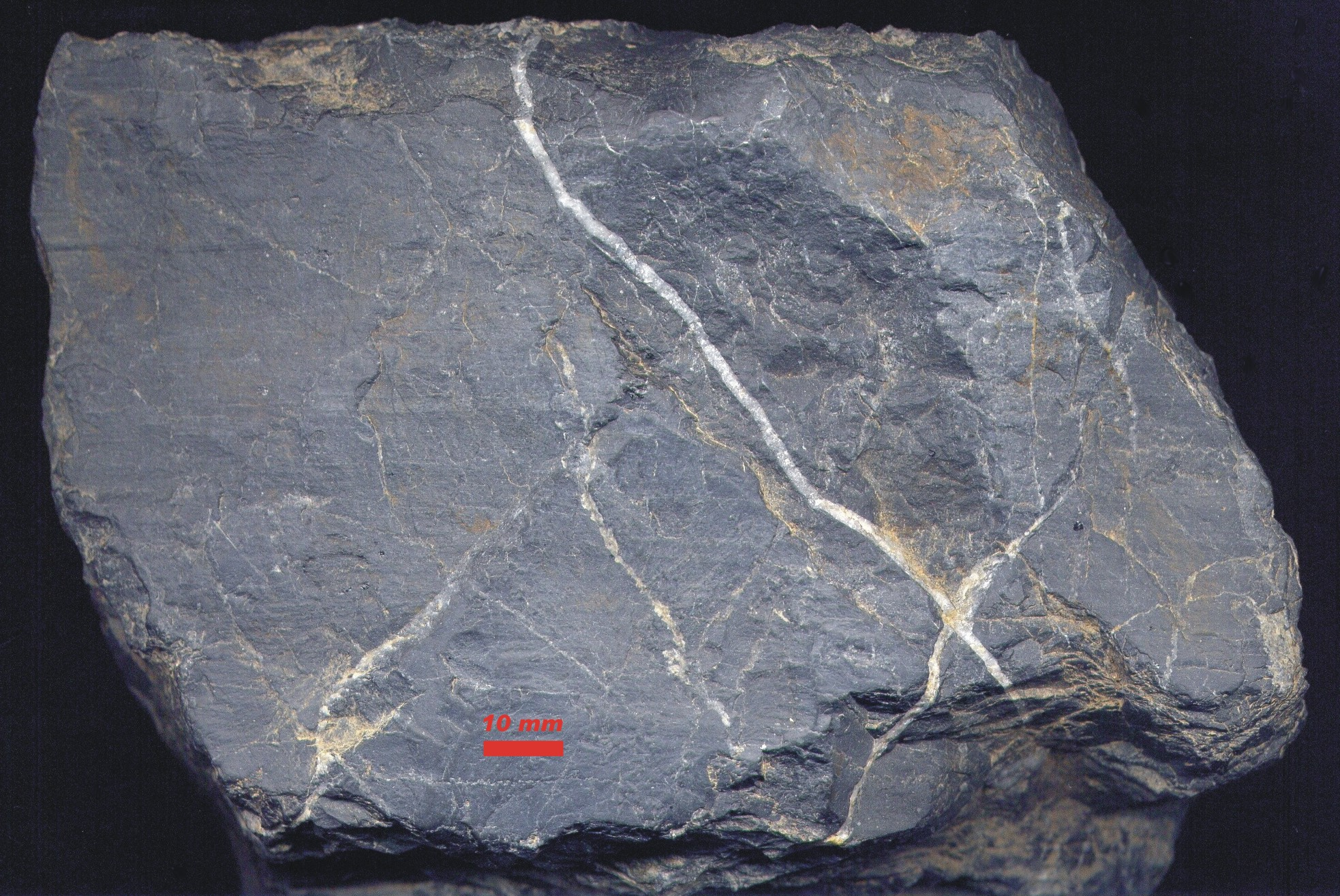 Lydit (Kieselschiefer aus dem Silur) aus dem Ketzerbachtal (Deutschland, Sachsen)